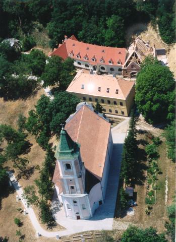 Homokkomárom, Hungary, aerialphotography. Kisboldogasszony római katolikus templom